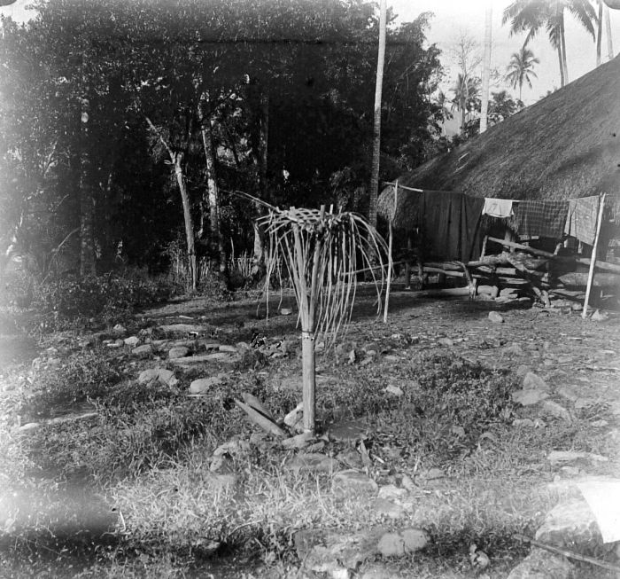 Negatief. Dorpsofferpaal (katoda paraing) in kampong Prai Kareha in Zuid-Soemba